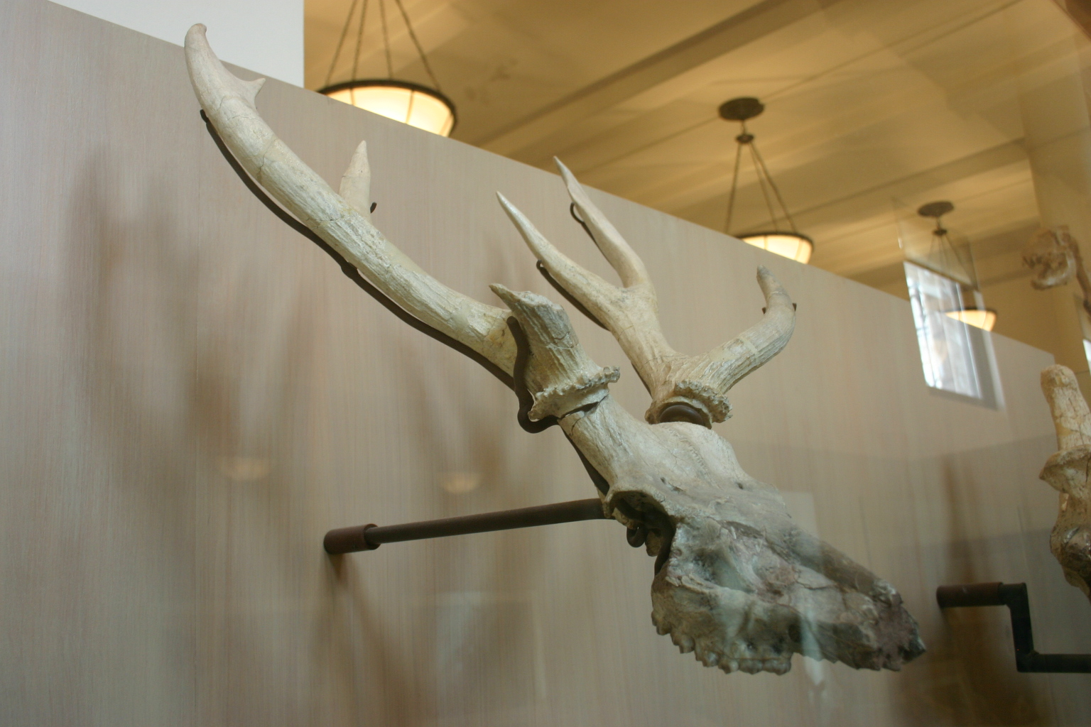 Cervoceros novorossiae